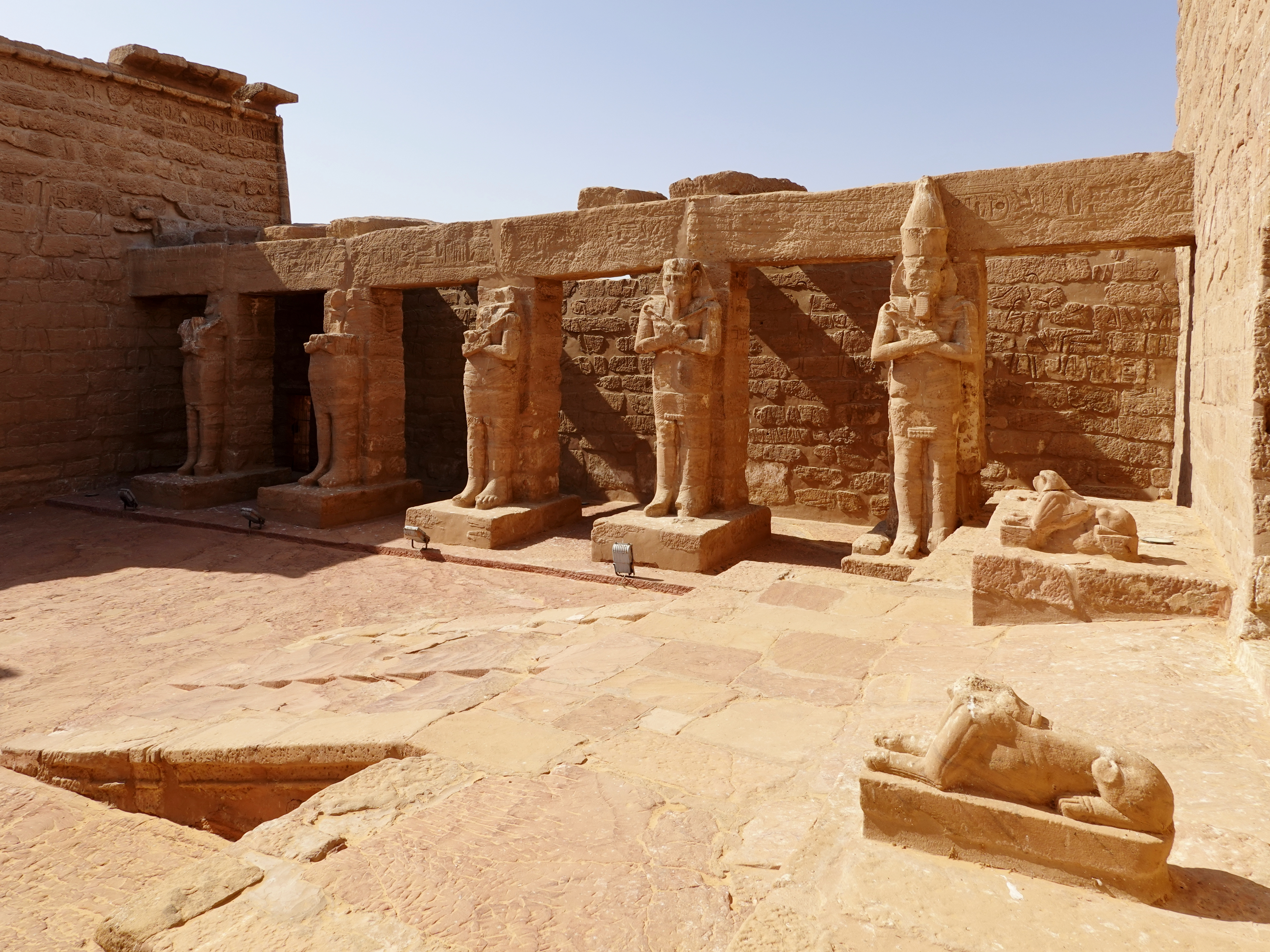 Tempel von Wadi es-Sebua am Nassersee, Ägypten